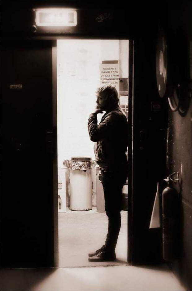 Francois van Coke